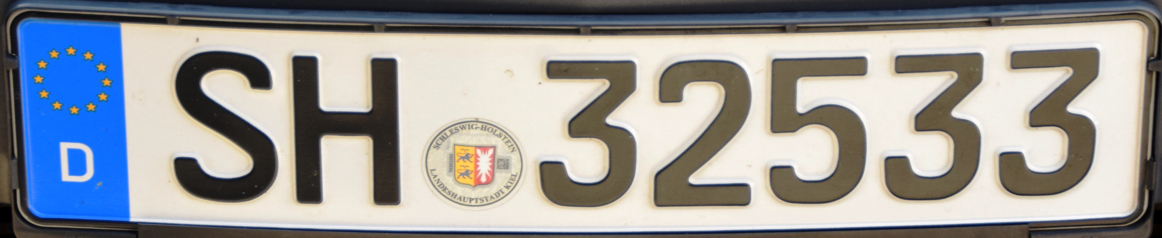 SH 32533 kentekenplaat van Schleswig-Holstein